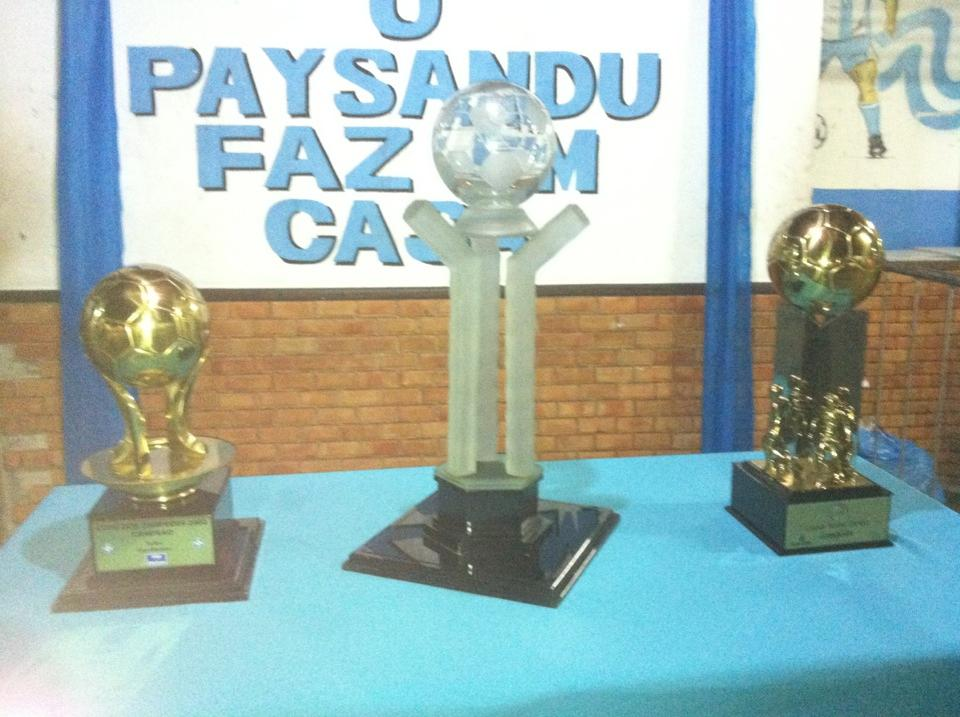 principais taças do Paysnadu na temporada 2002